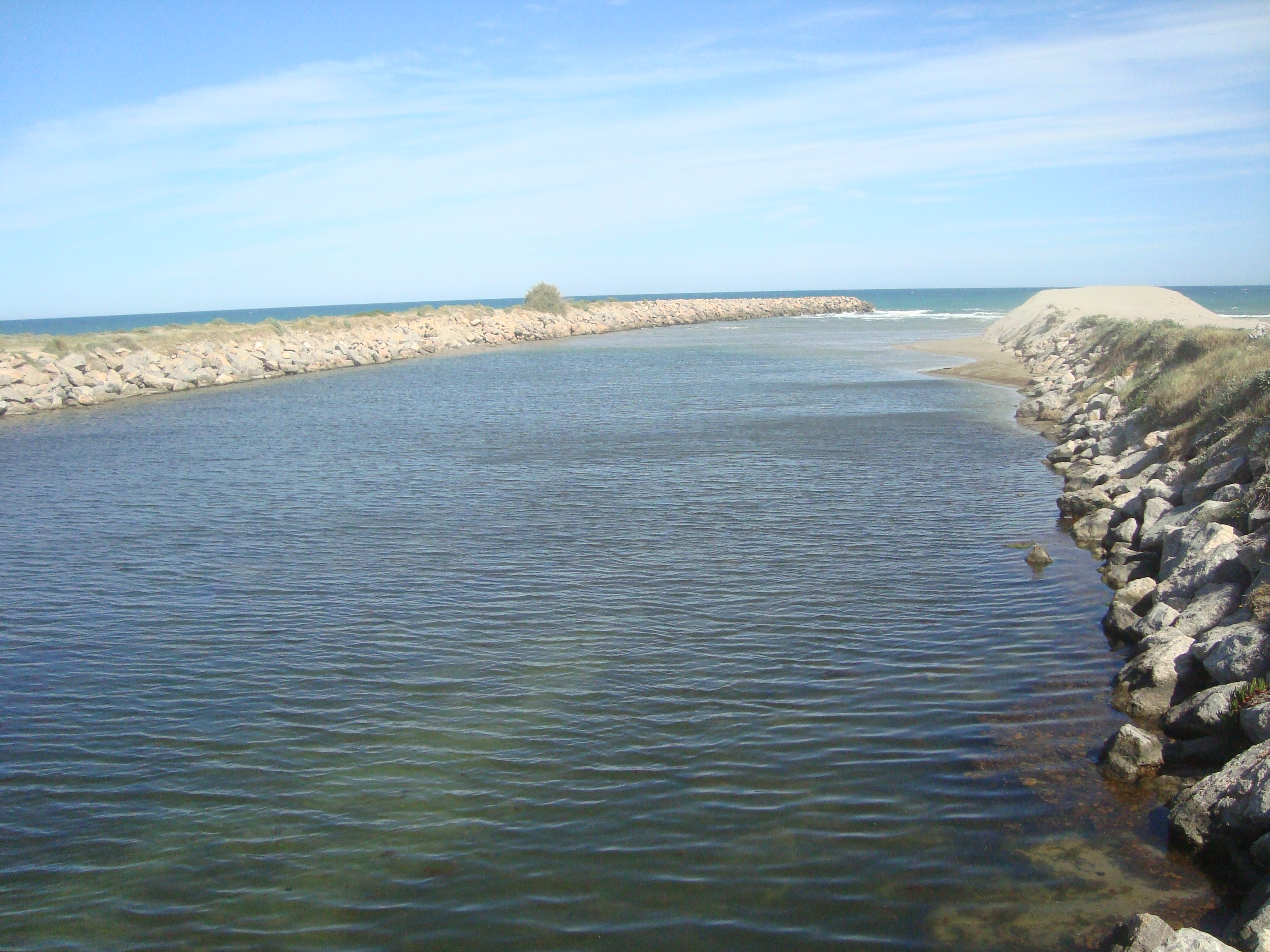 Desembocadura del Rio Seco (Castellón de la Plana)